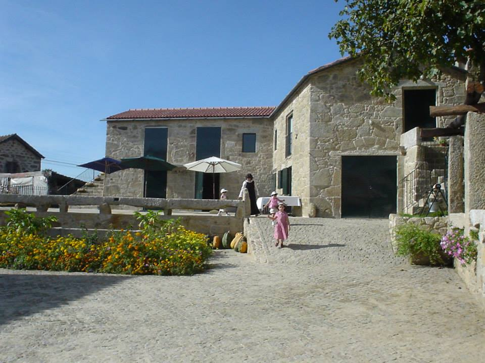 Casa São Miguel - Turismo Rural e Eventos - Gondomar: eira